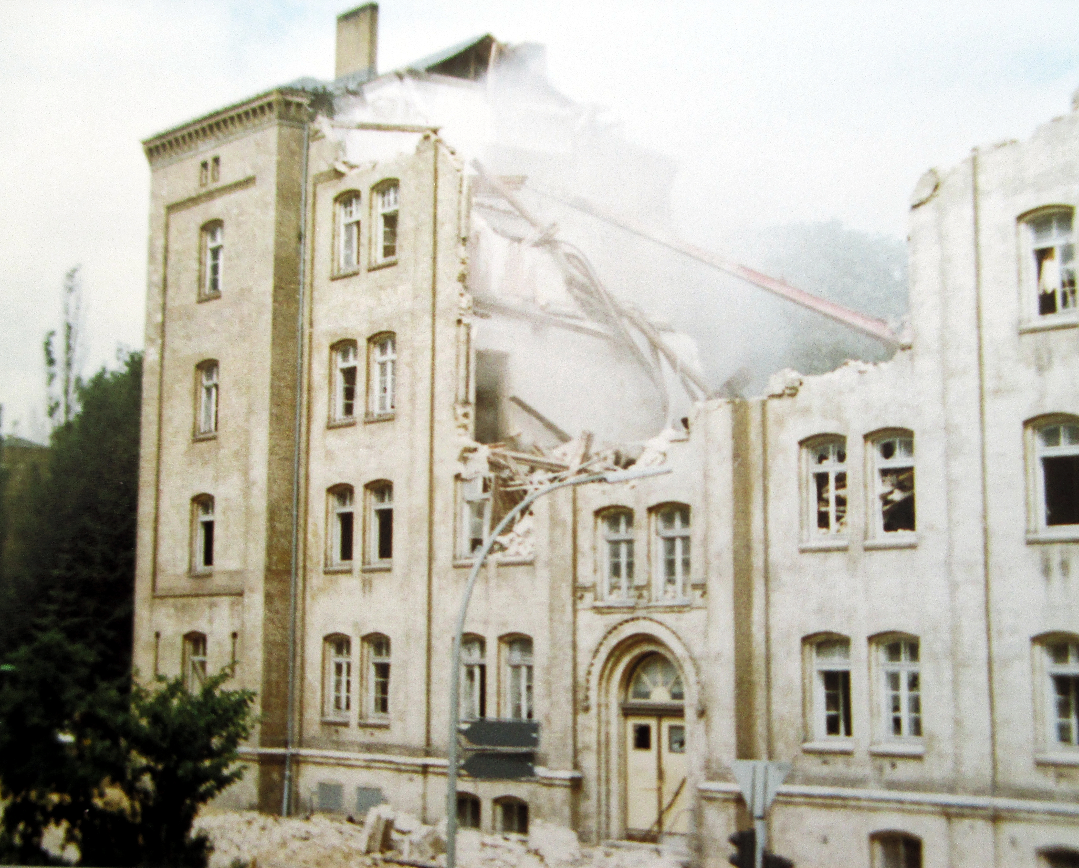 Flensburg Duburg Kasernen 07/88; Fotos erkennbarer Weise aus einem Privatalbum im nachhinein nochmals abfototgrafiert